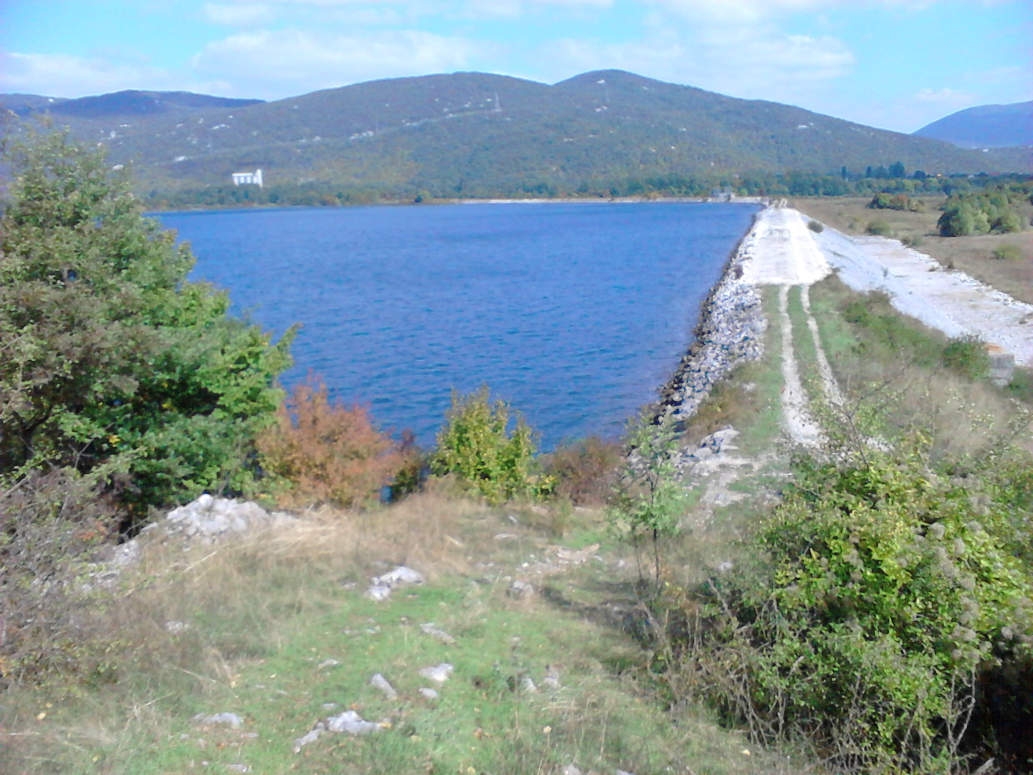 Jezero Ričice